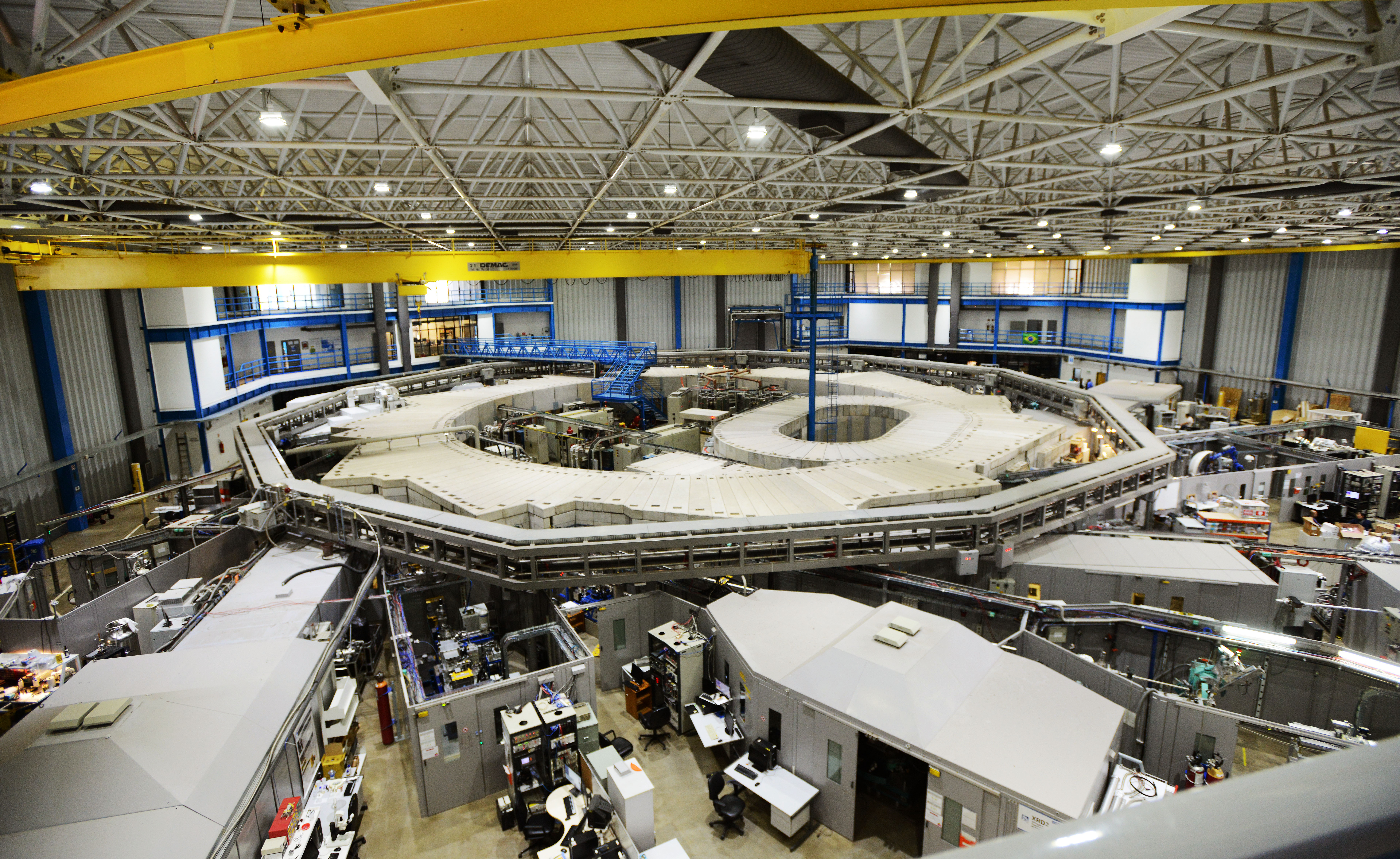 Foto Carlos Bassan